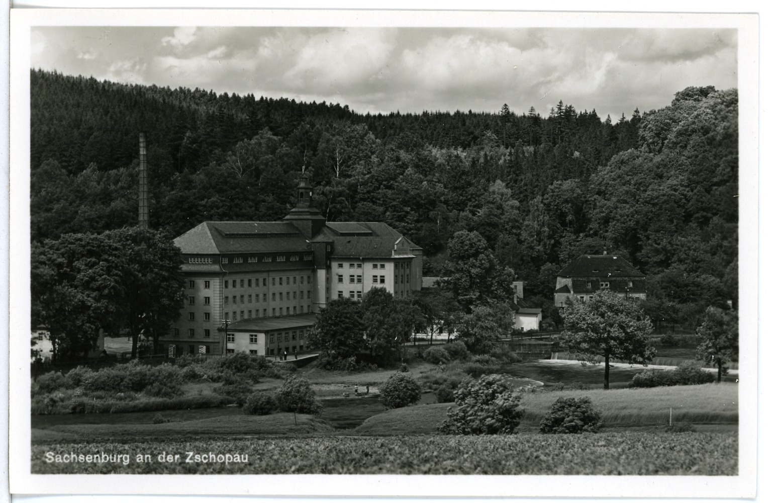 Sachsenburg; Blick auf Sachsenburg This postcard is from publisher Brück & Sohn in Meißen ( postcard has a unique number 26175 and is available in a higher resolution at the publisher. This images was uploaded in a cooperation project between Wikipedians and the publisher.